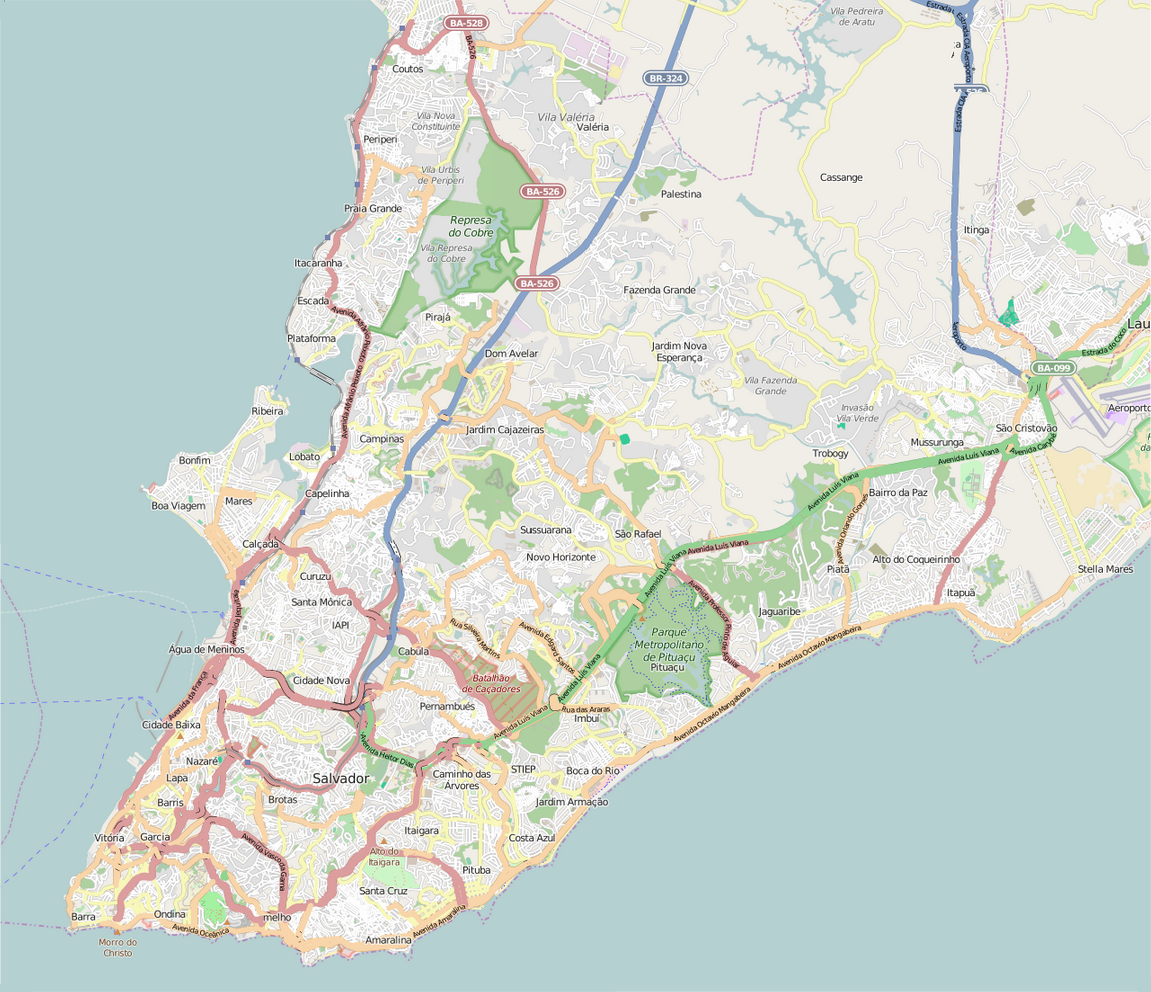 Mapa da Região Metropolitana de Salvador. This map may be incomplete, and may contain errors. Don't rely solely on it for navigation.